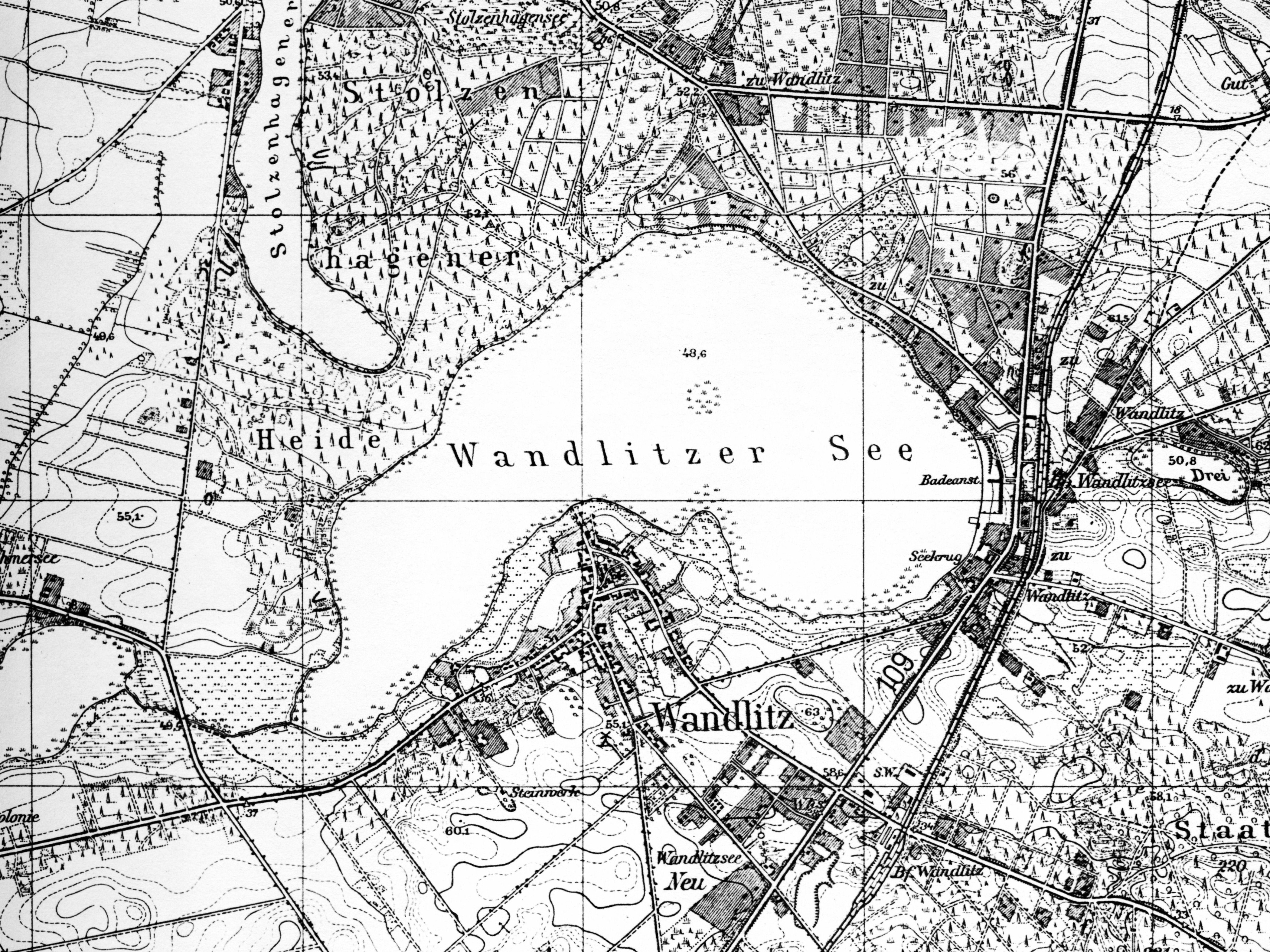 Karte des Wandlitzer Sees im Niederbarnim im Jahr 1903, Mark Brandenburg, Deutschland